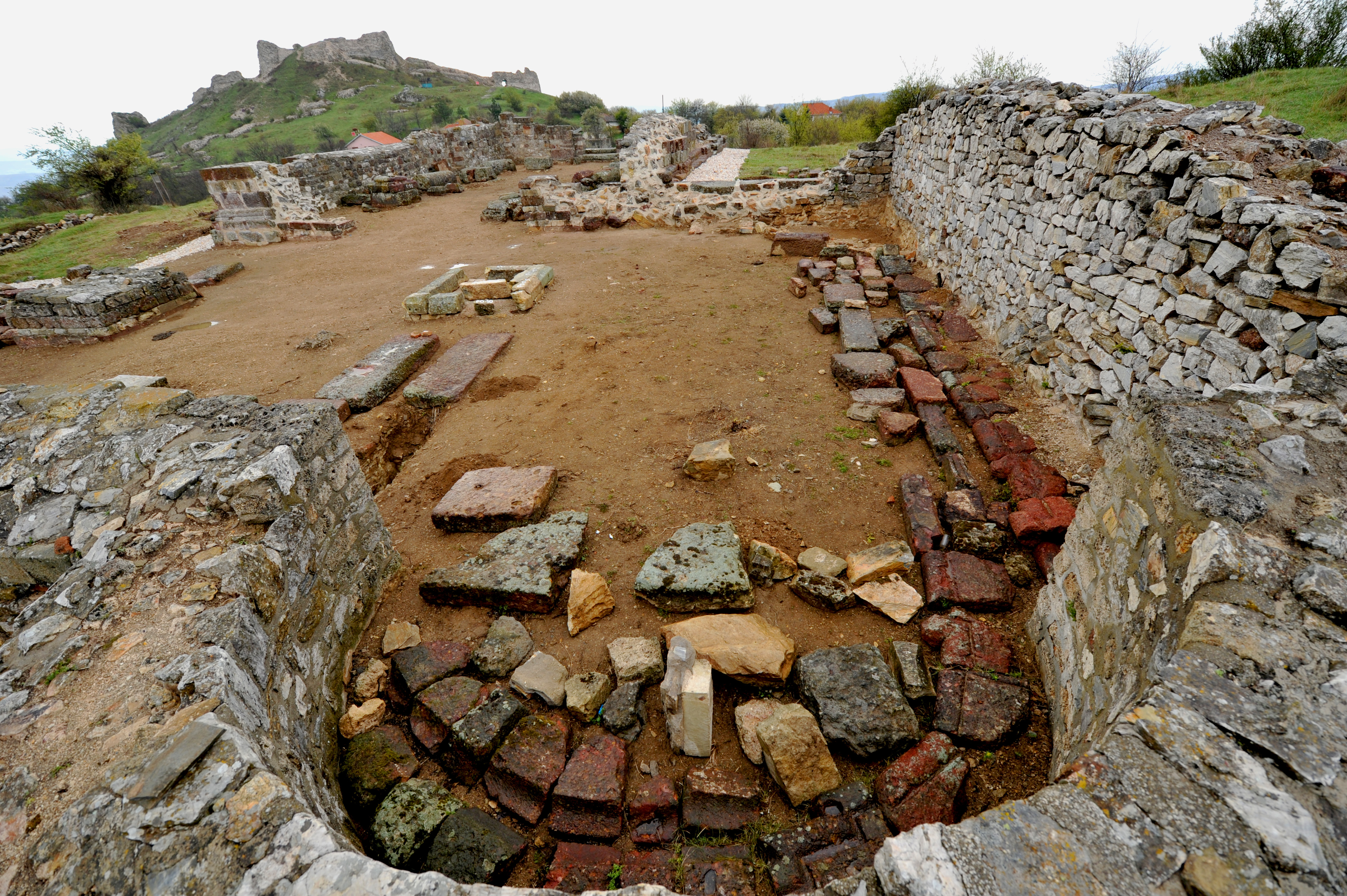 Gërmadhat e katedrales së Artanës